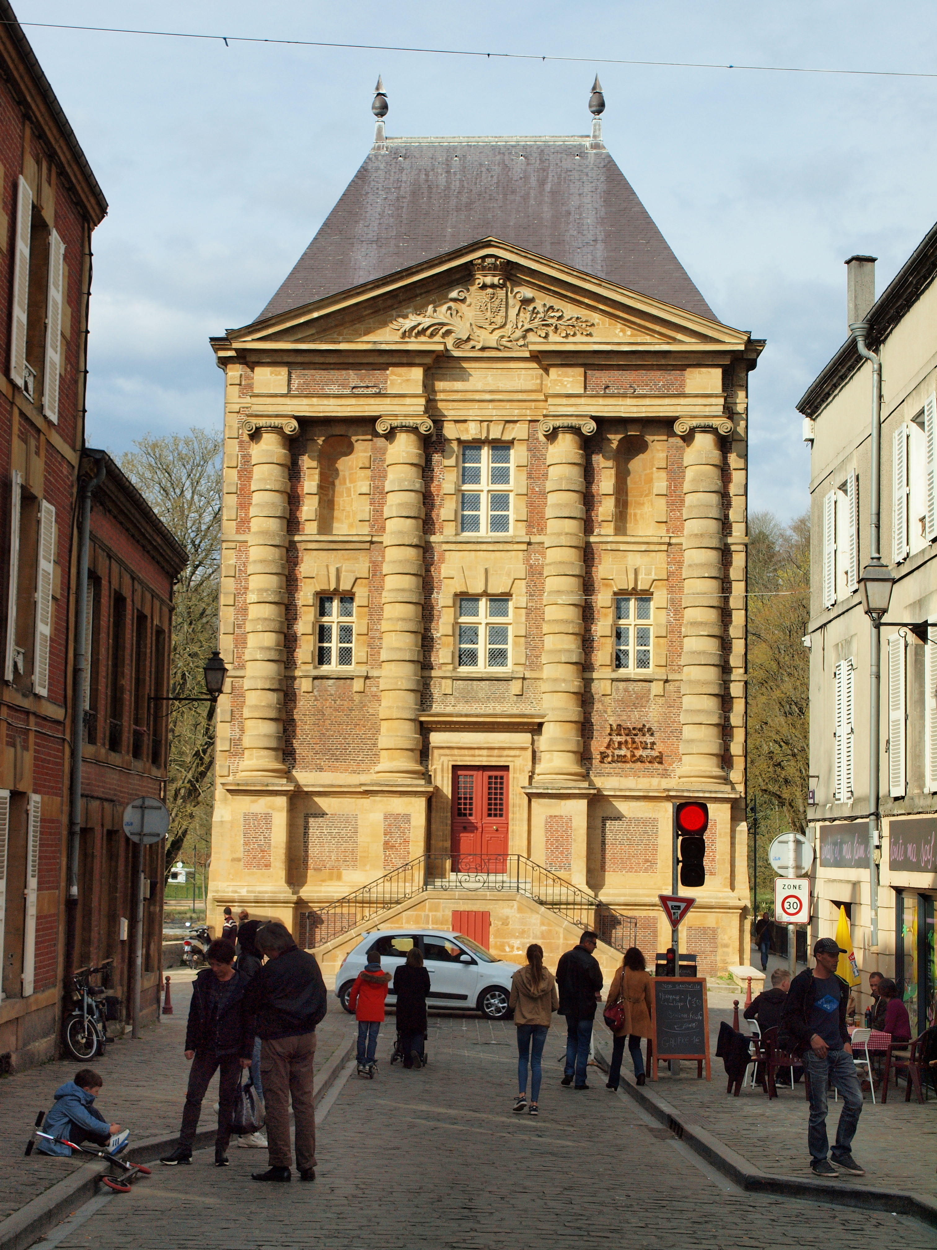 Charleville-Mézières (Ardennes, France) ; le Vieux Moulin, qui abrite le Musée Arthur Rimbaud, en avril 2016.